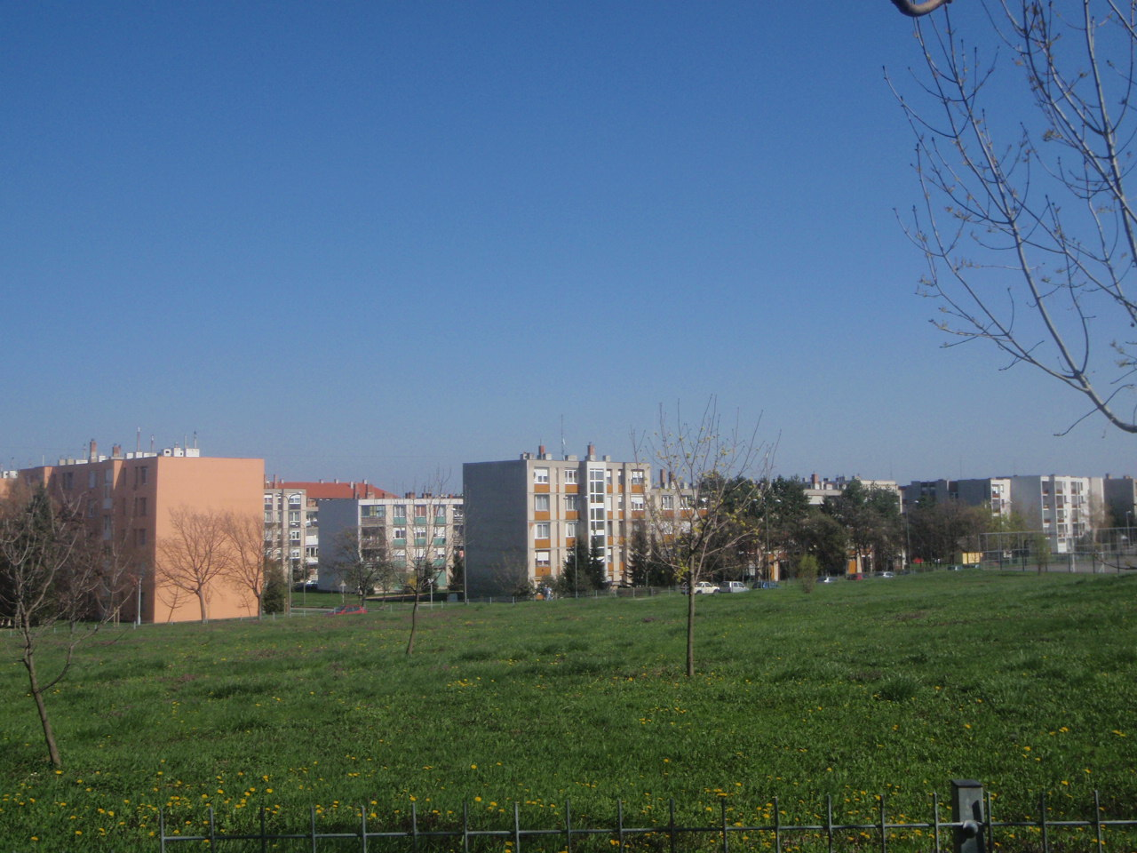 Wohngebiet in Neustadt von Güns